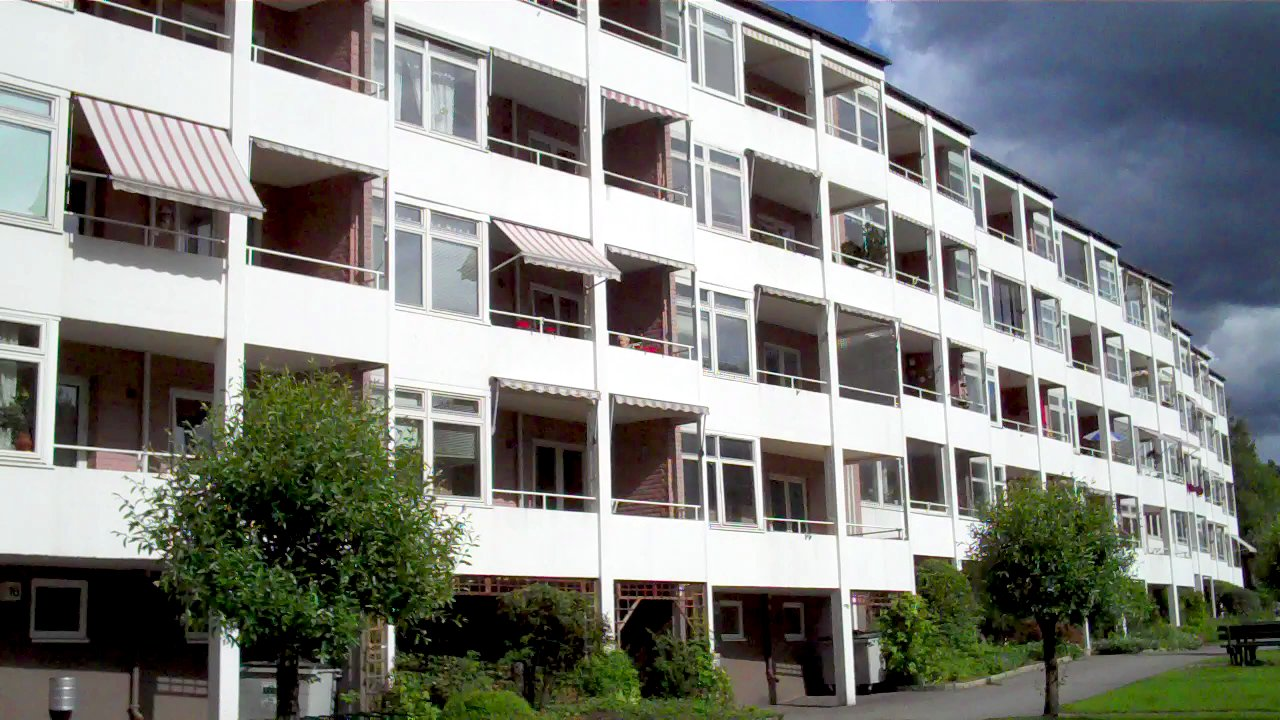 Bølerlia 12-30, Bøler i Oslo.